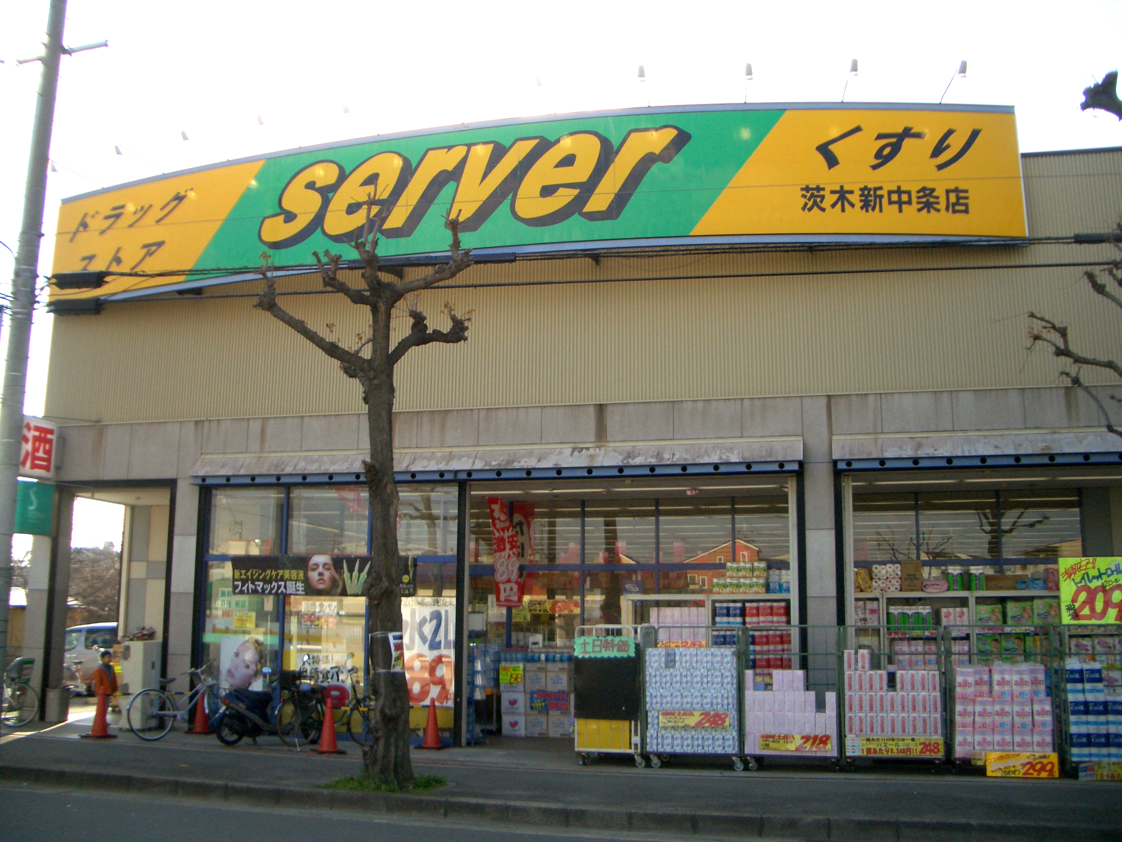 Server Ibaraki Shinchujo,Shinchujo Ibaraki-City Osaka Japan.